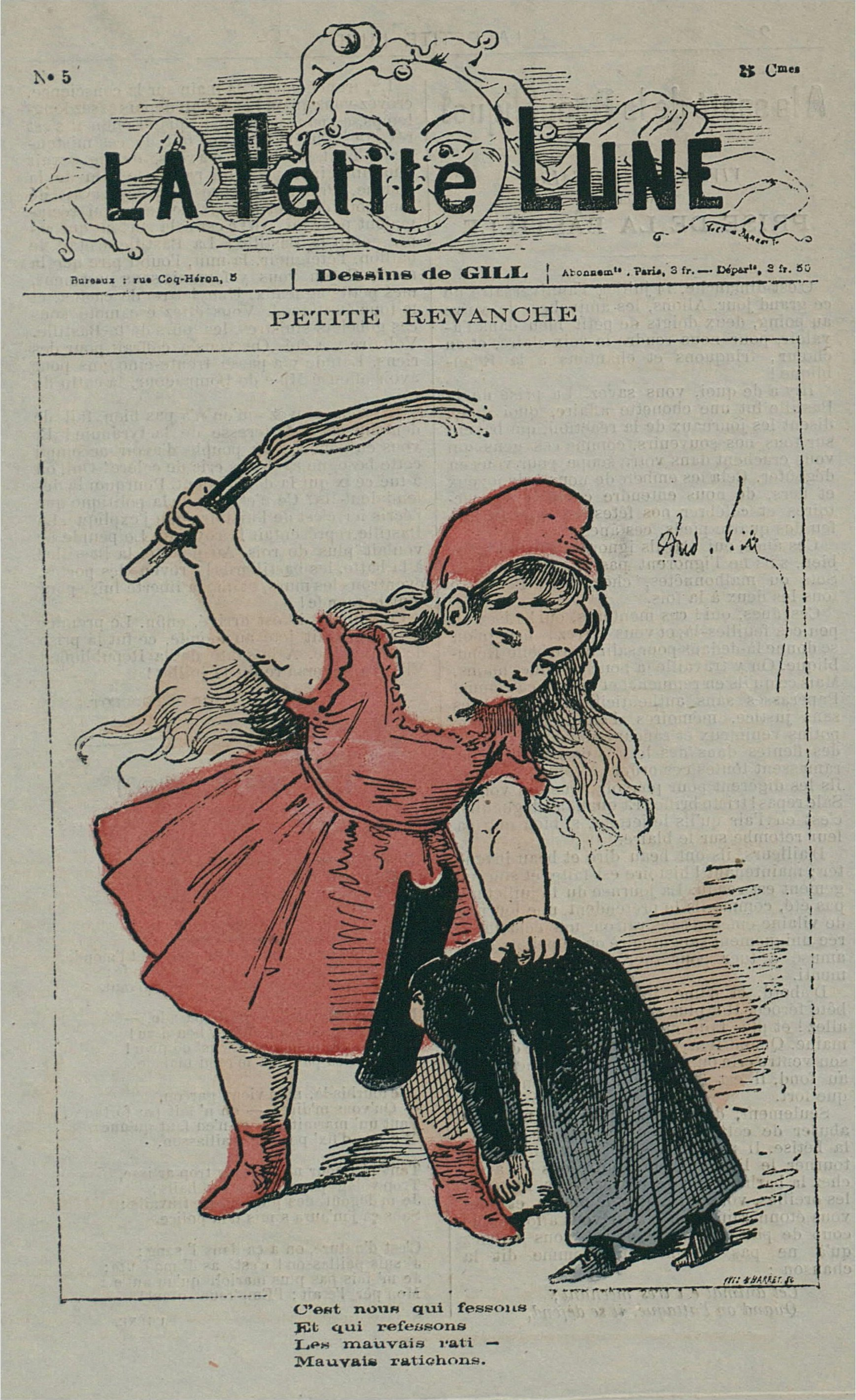 La Petite Lune n°5 : « Petite revanche. C'est nous qui fessons Et qui refessons Les mauvais rati — Les mauvais ratichons. » Une Marianne enfant fesse un curé avec un martinet.